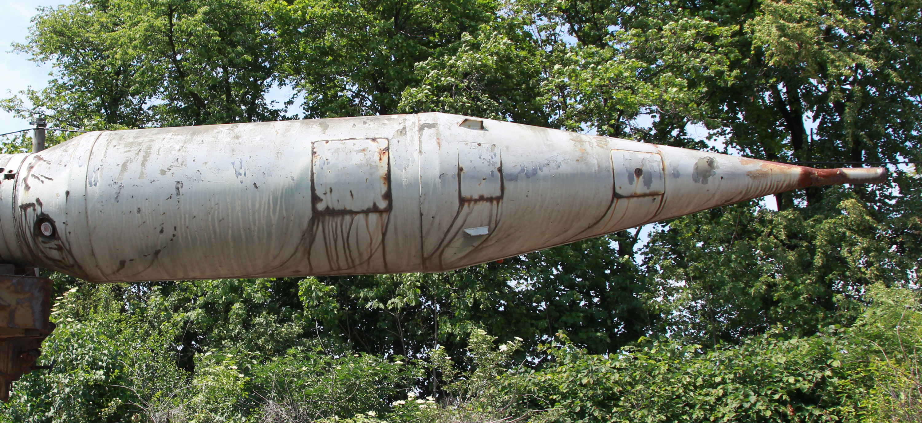 Głowica 3N14 rakiety 3R10 zestawu rakietowego 2K6 Luna